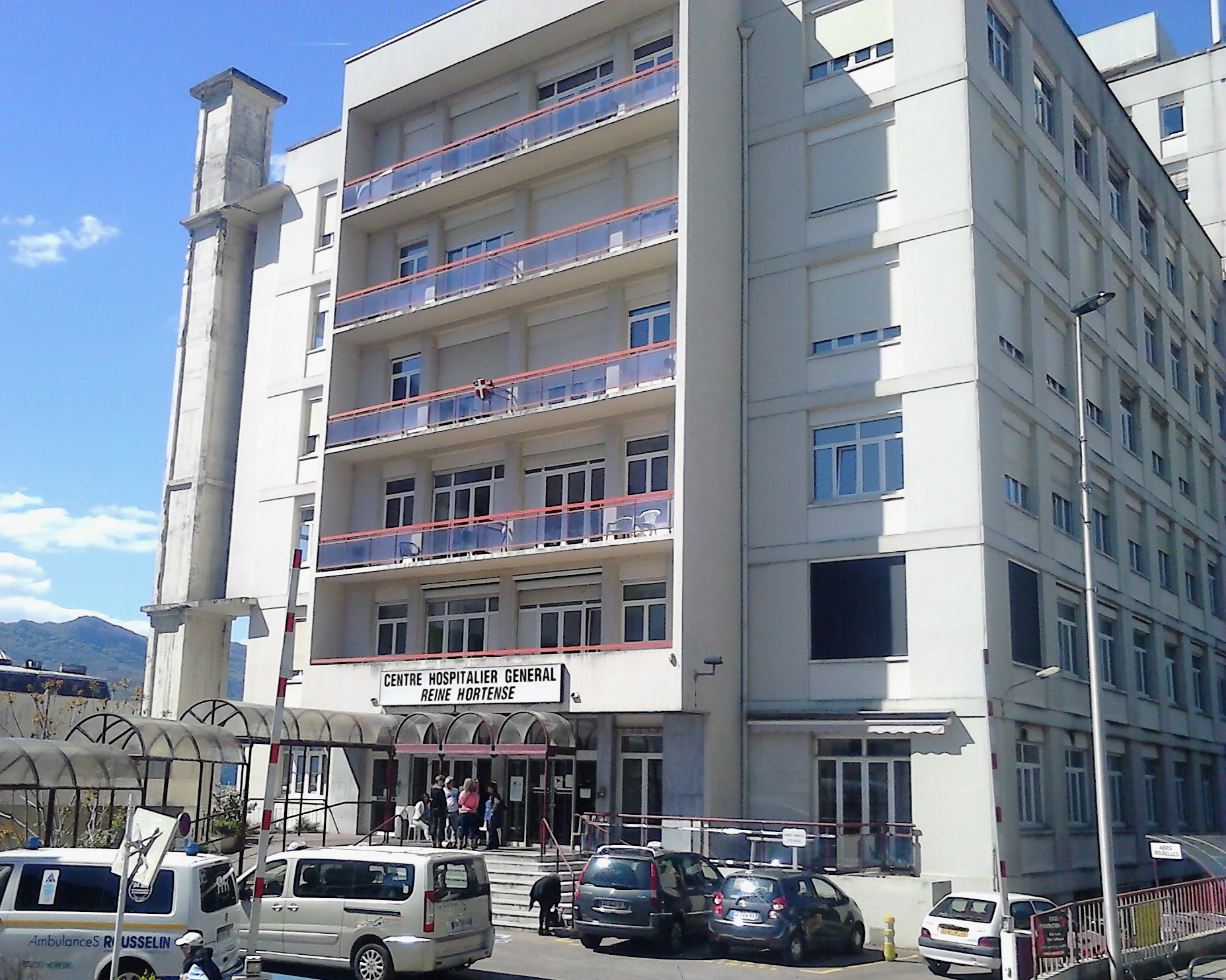 Vue sur l'entrée du centre hospitalier général Reine Hortense dans Aix-les-Bains (73).